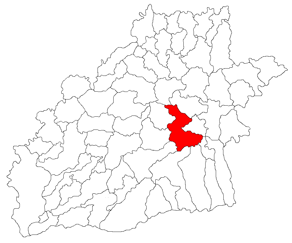 Categorie:Hărţi ale judeţului Sibiu